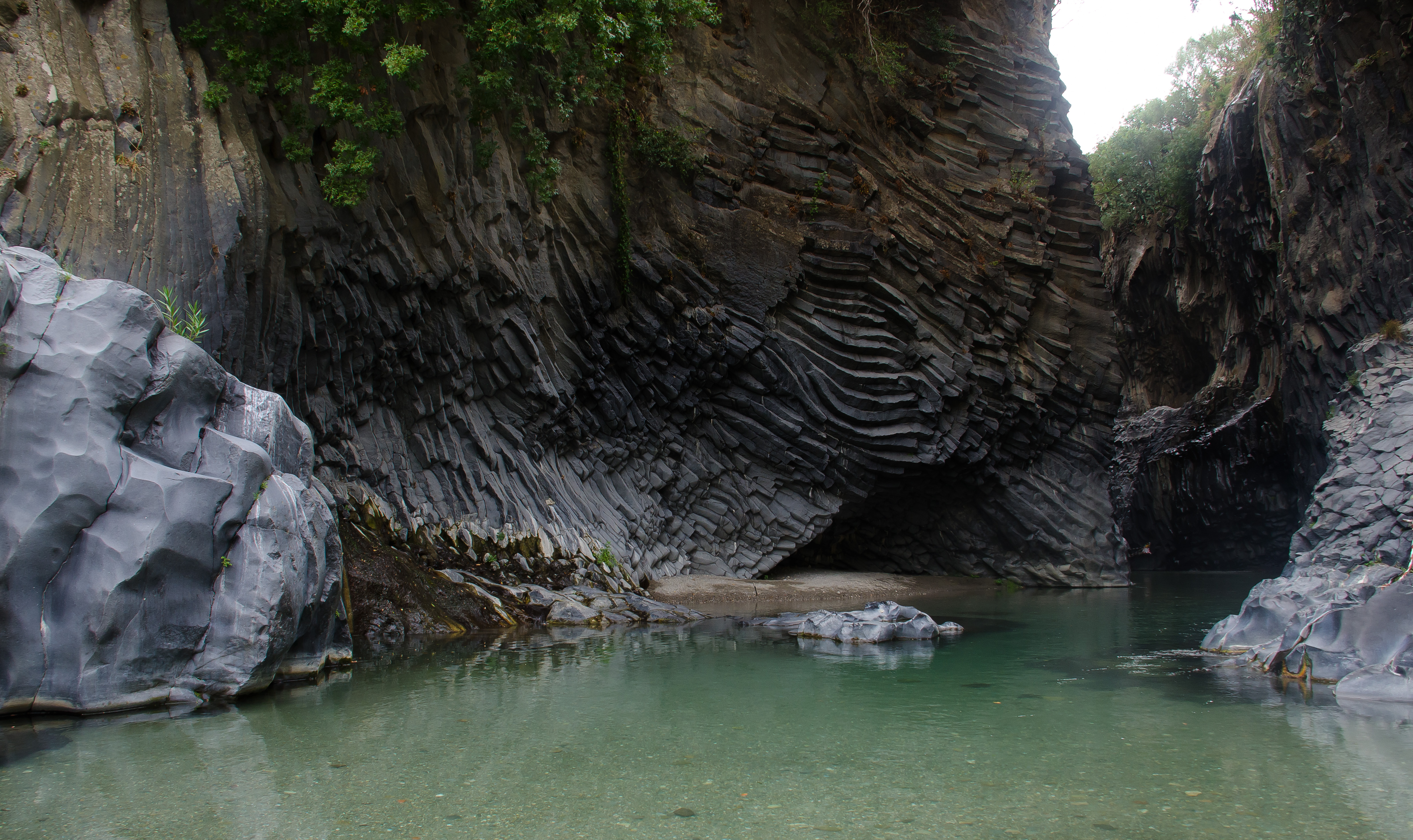 Gole dell'Alcantara, near Francavilla di Sicilia